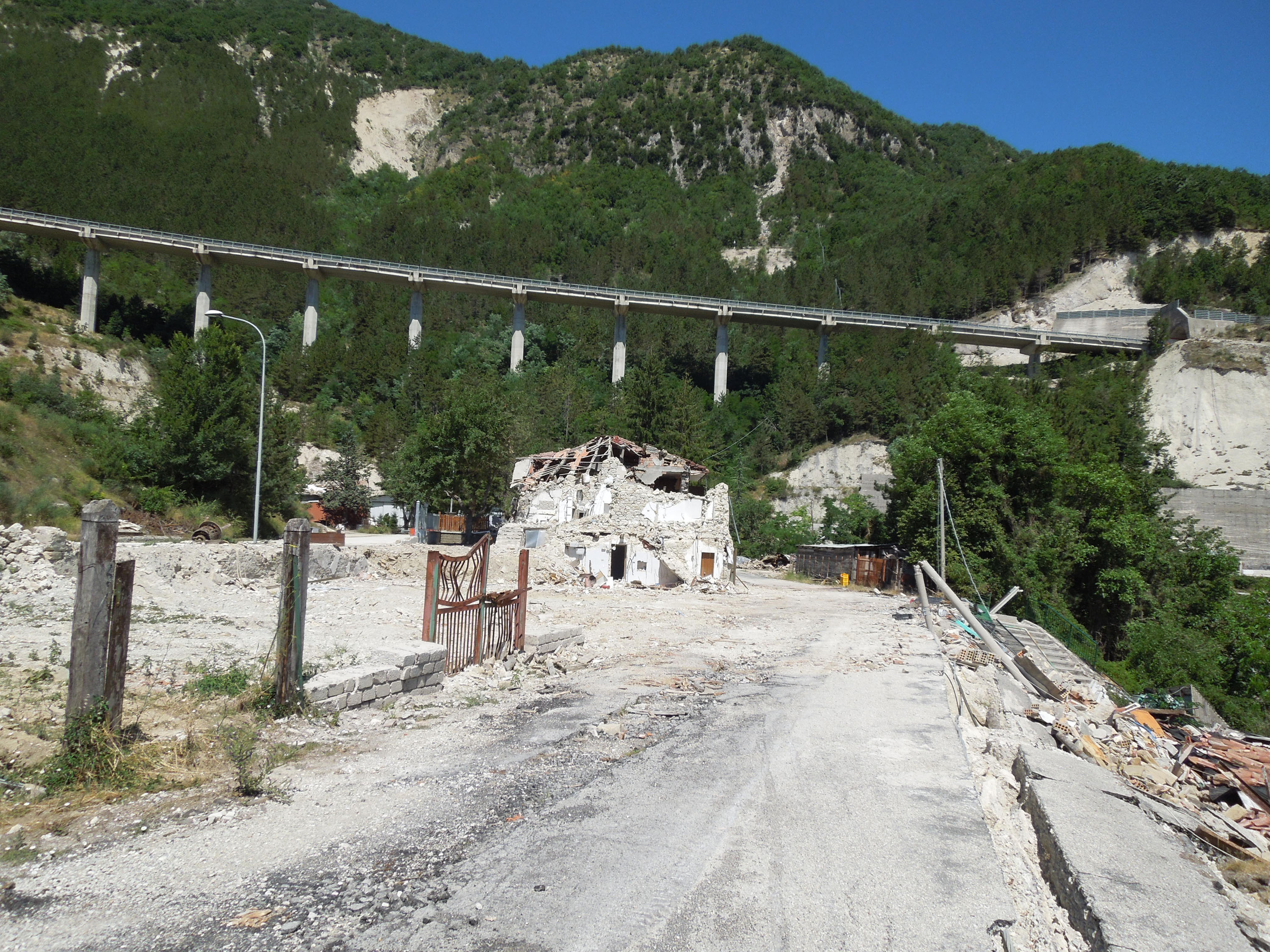 Panorama del paese di Pescara del Tronto che inquadra le macerie dell'abitato che sorgeva lungo la diramazione della Vecchia Salaria, oggi SP129. L'immagine è stata scattata all'interno della zona rossa il 27 luglio 2017.